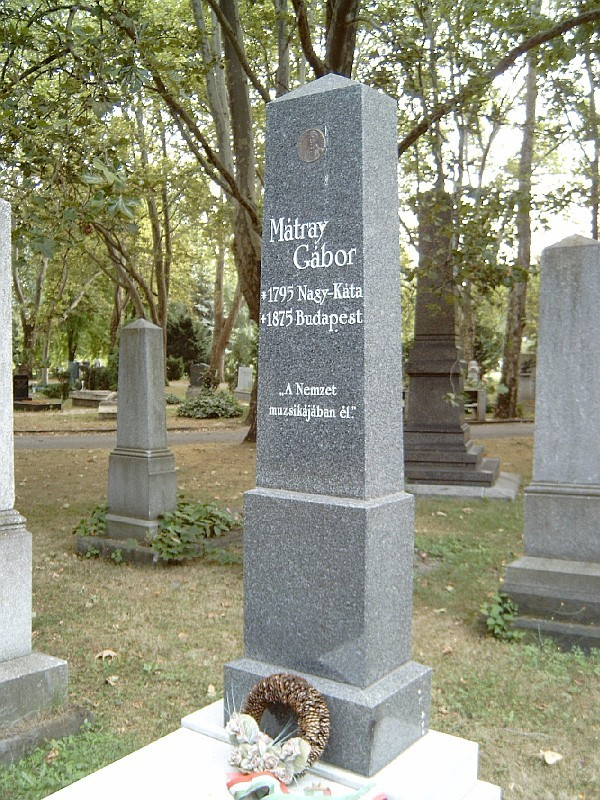 Mátray Gábor, Rothkrepf (Nagykáta, 1797, nov. 23. – Bp., 1875. júl. 17.): zeneszerző, zenetörténész, pedagógus sírja Budapesten. Kerepesi temető: 34/1-1-27.